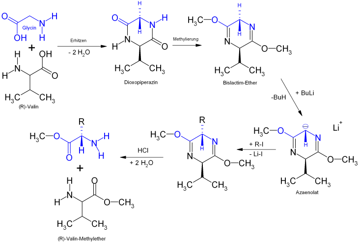 Schoellkopf-Hartwig-Reaction / Darstellung von Aminosäuren mittels Schöllkopf-Hartwig-Reaktion